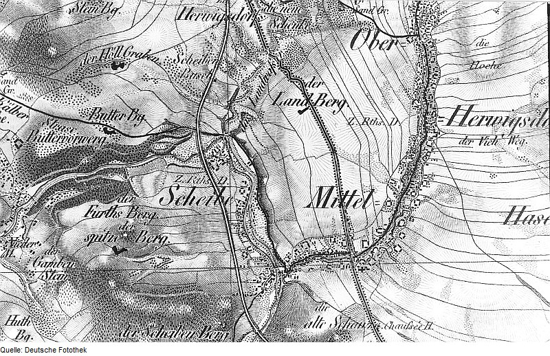 Original image description from the Deutsche Fotothek Mittelherwigsdorf-Scheibe. Oberreit, Sect. Zittau, 1844/46